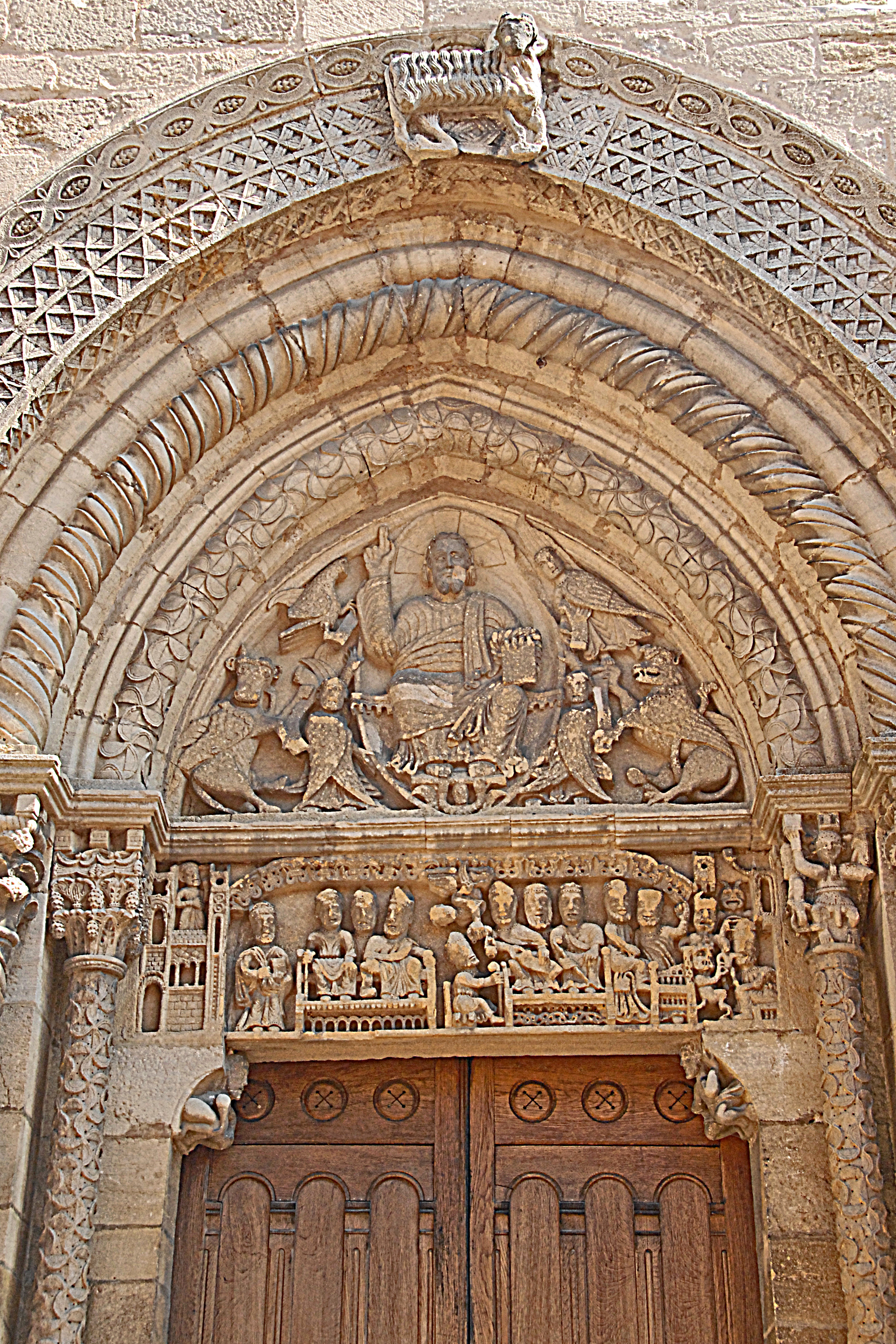 St-Hilaire de Semur-en-Brionnais, Archivolten mit Tympanon